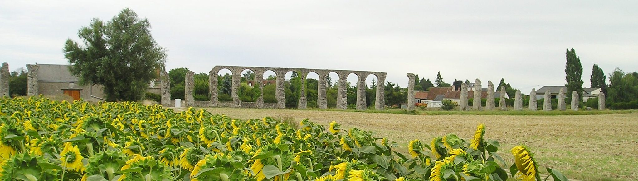 Römisches Aquaedukt bei Luynes